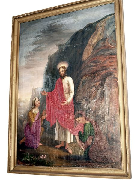 Alsted Kirke i Danmark. Tidligere altertavle ophængt i tårnrummet